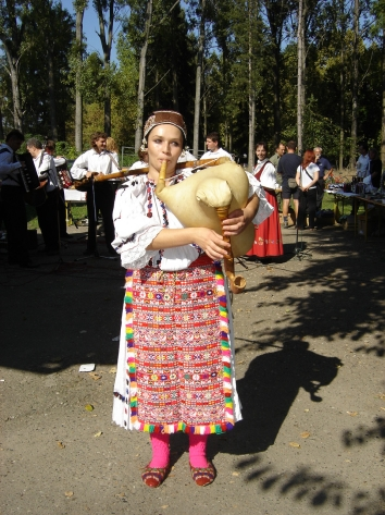 Maja Kešić, gajdašica, nastup u Zlatnoj Gredi